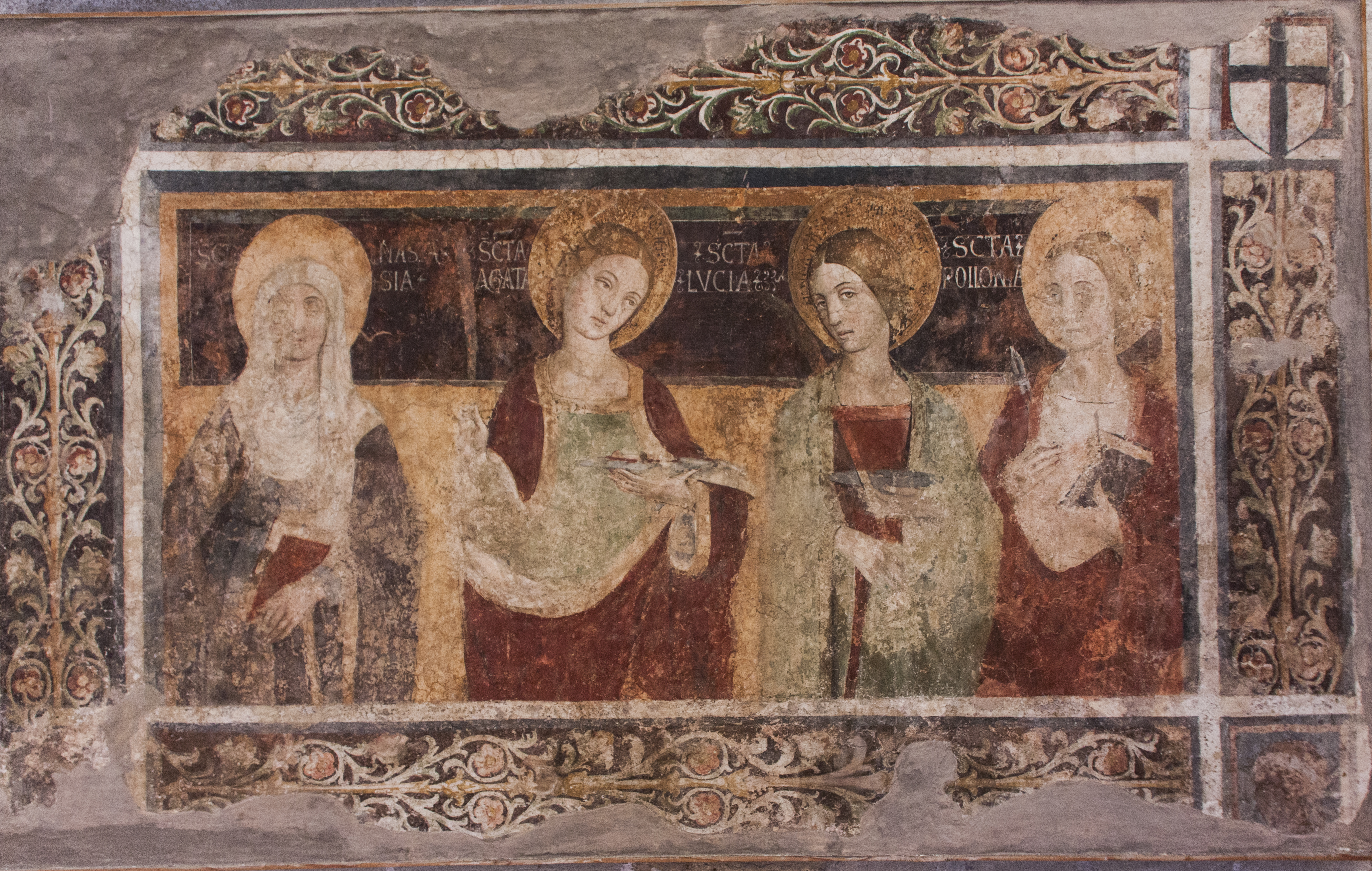 Le SS. Anastasia, Agata, Lucia e Apollonia - Tommaso de Vigilis (Cappella dell'Ordine dei Teutonici di Risalaimi, Marineo)